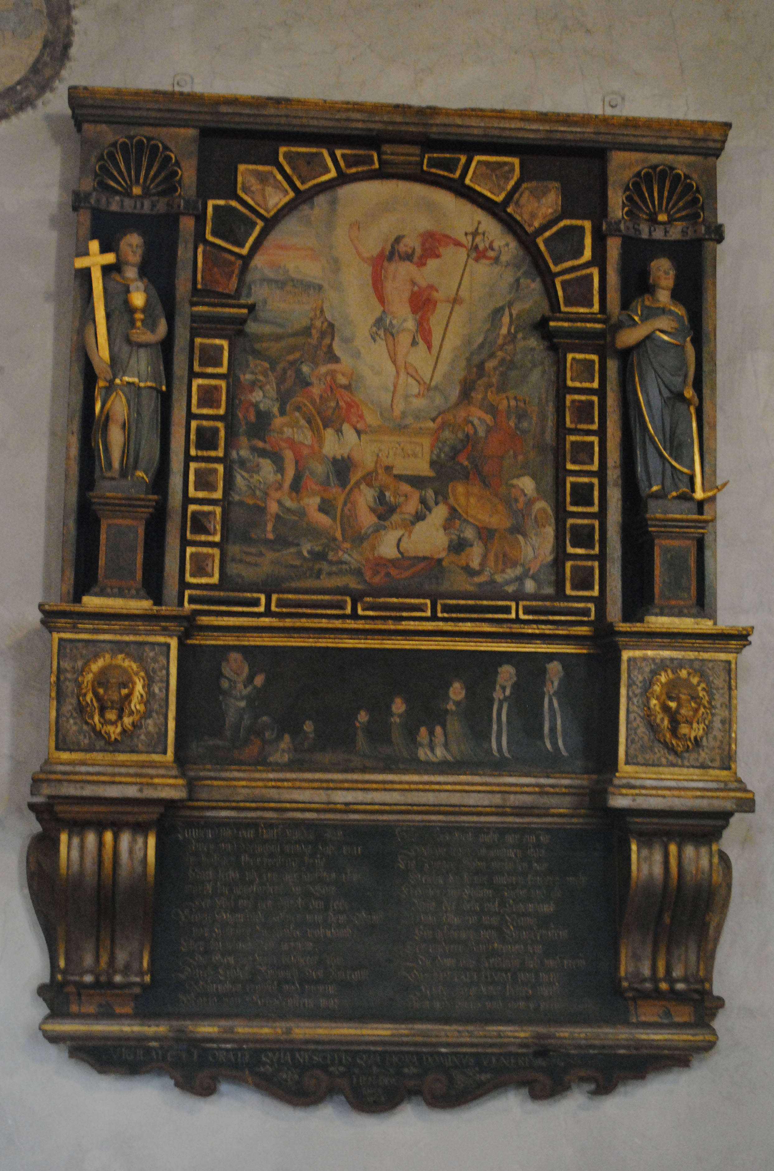 Epitaph, Georg Sigismund Zollner von der Hallburg, Maria im Weingarten, Volkach